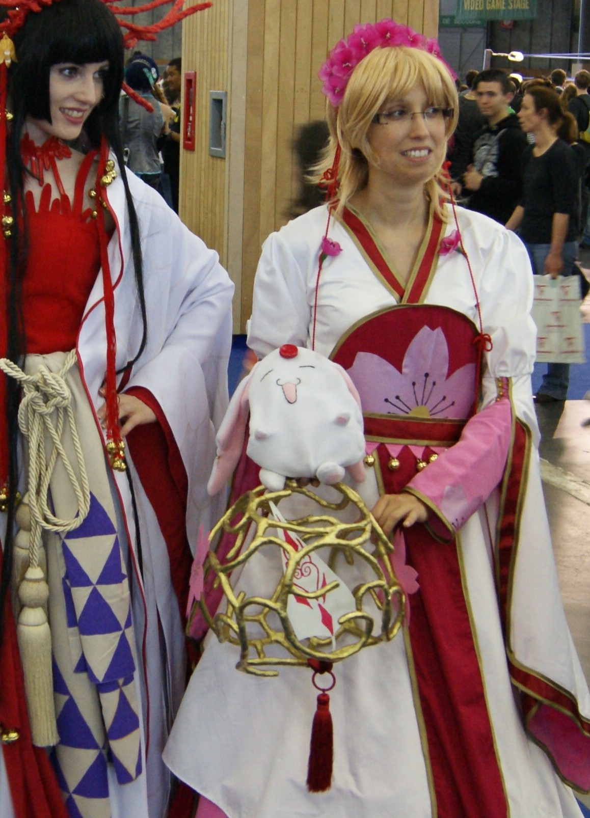 Mokona dans les bras de deux cosplayer, Japan Expo 2012.